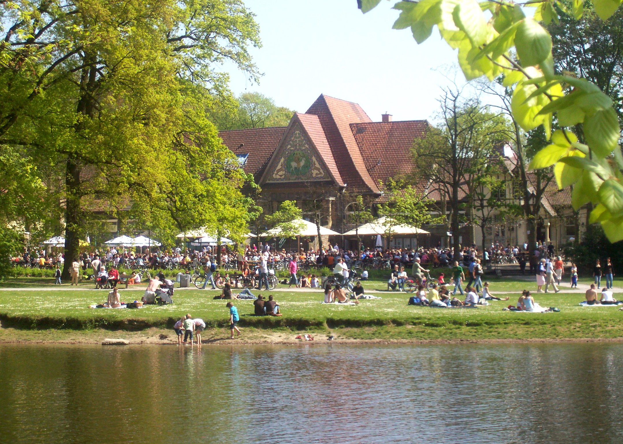 Bildbeschreibung: Stadtwaldhaus, Krefeld Quelle: selbst fotografiert Datum: 18.06.2006 Fotograf/Zeichner: DER UNFASSBARE